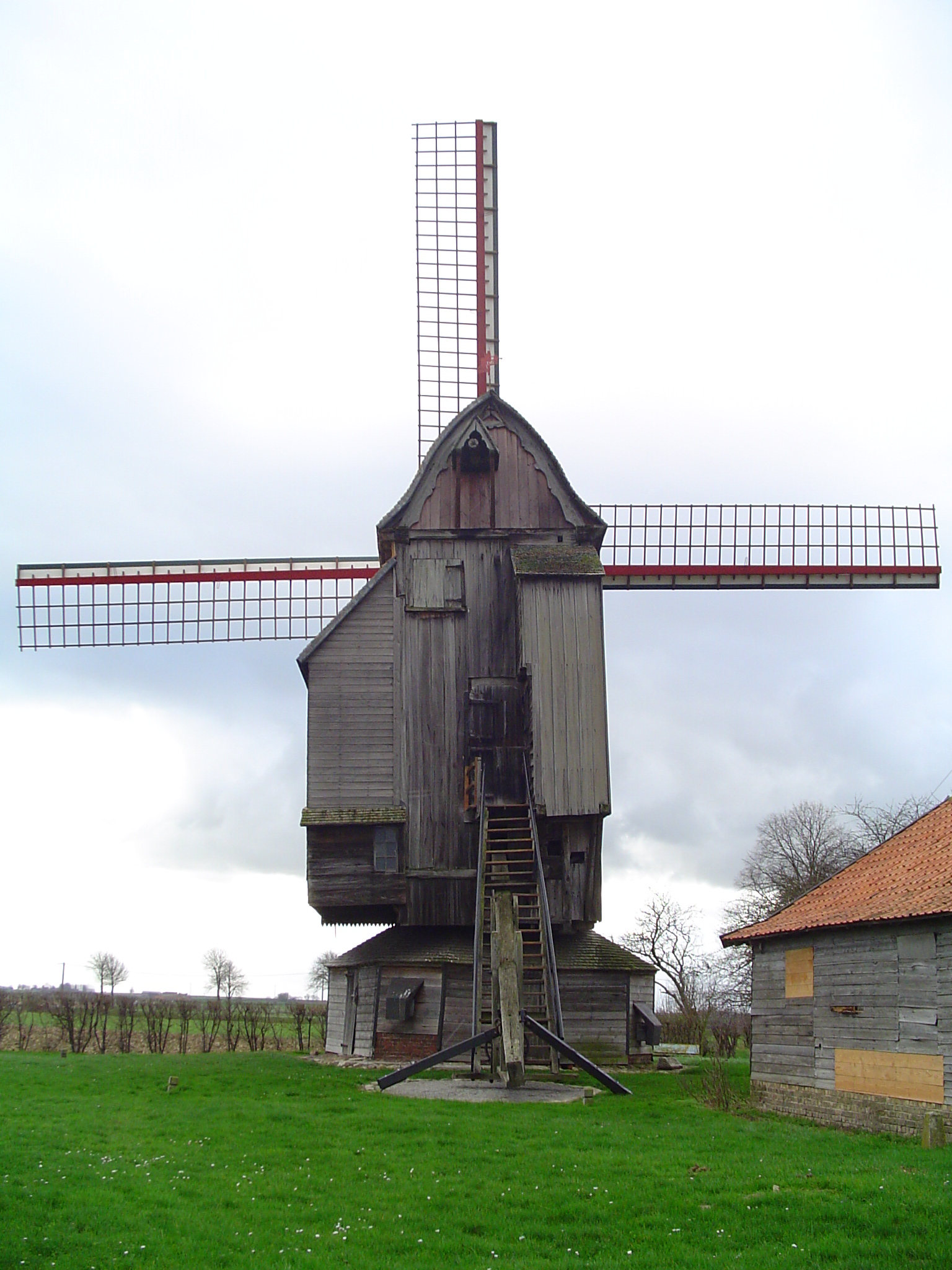 Moulin à Wormhout